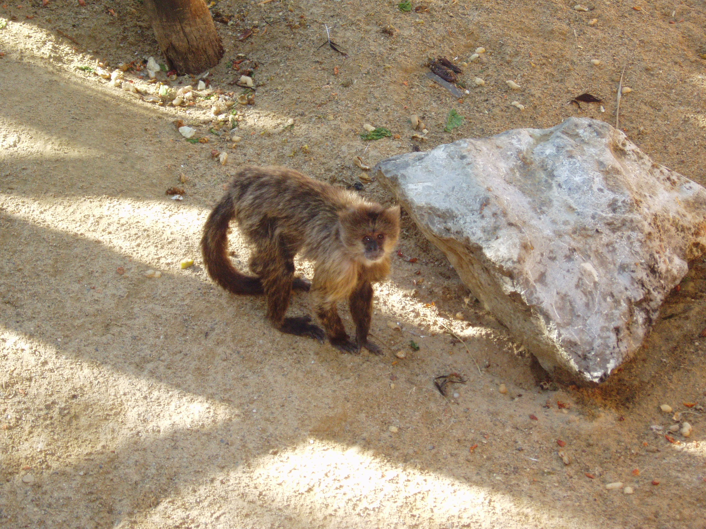 Capuchino llorón (Cebus nigrivittatus Syn. Cebus olivaceus) en el zoo de Jerez de la Frontera, Andalucía, España.